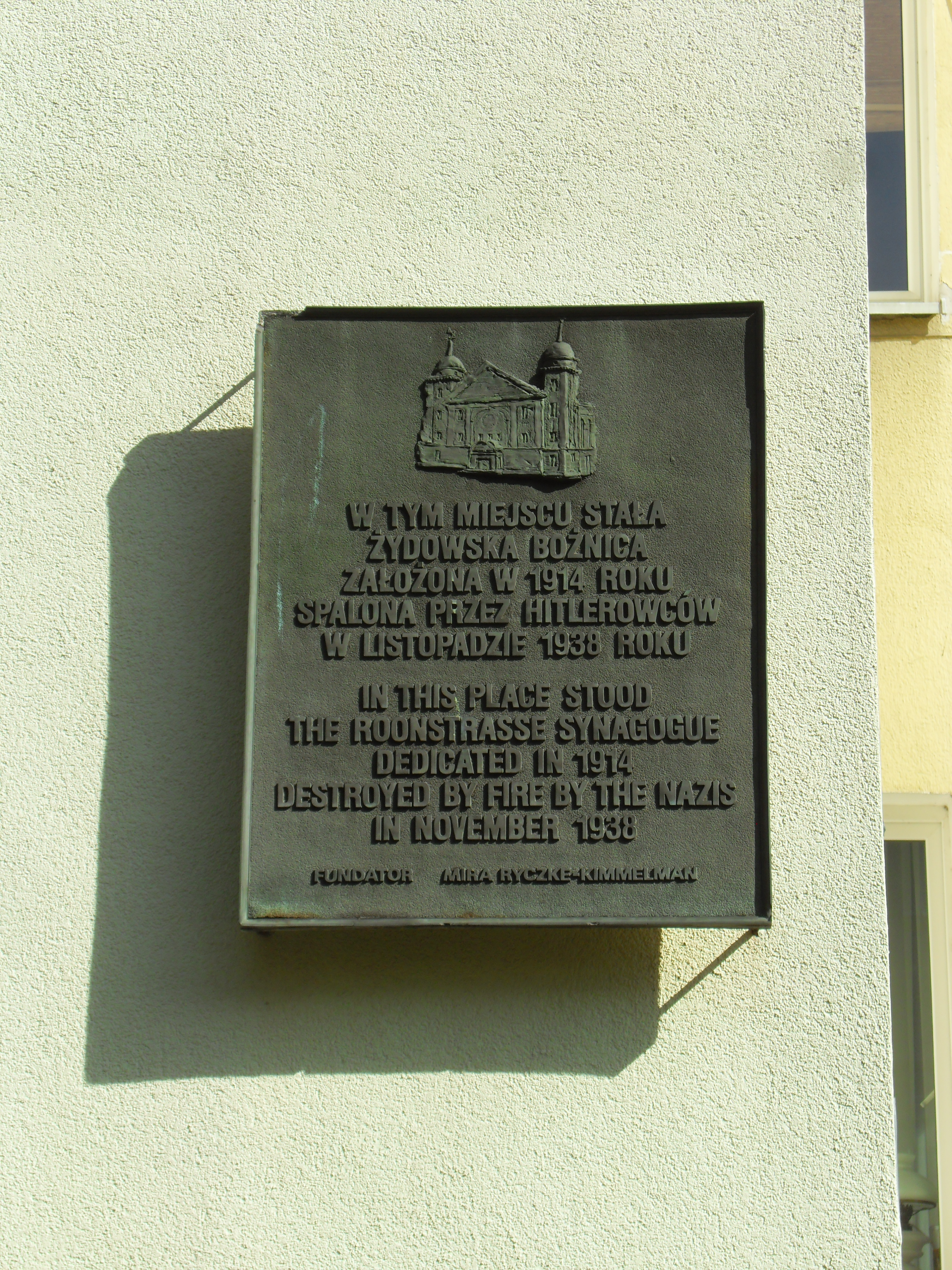 Sopot Dolny, ul. Dąbrowskiego. Tablica upamiętniająca nieistniejącą synagogę.